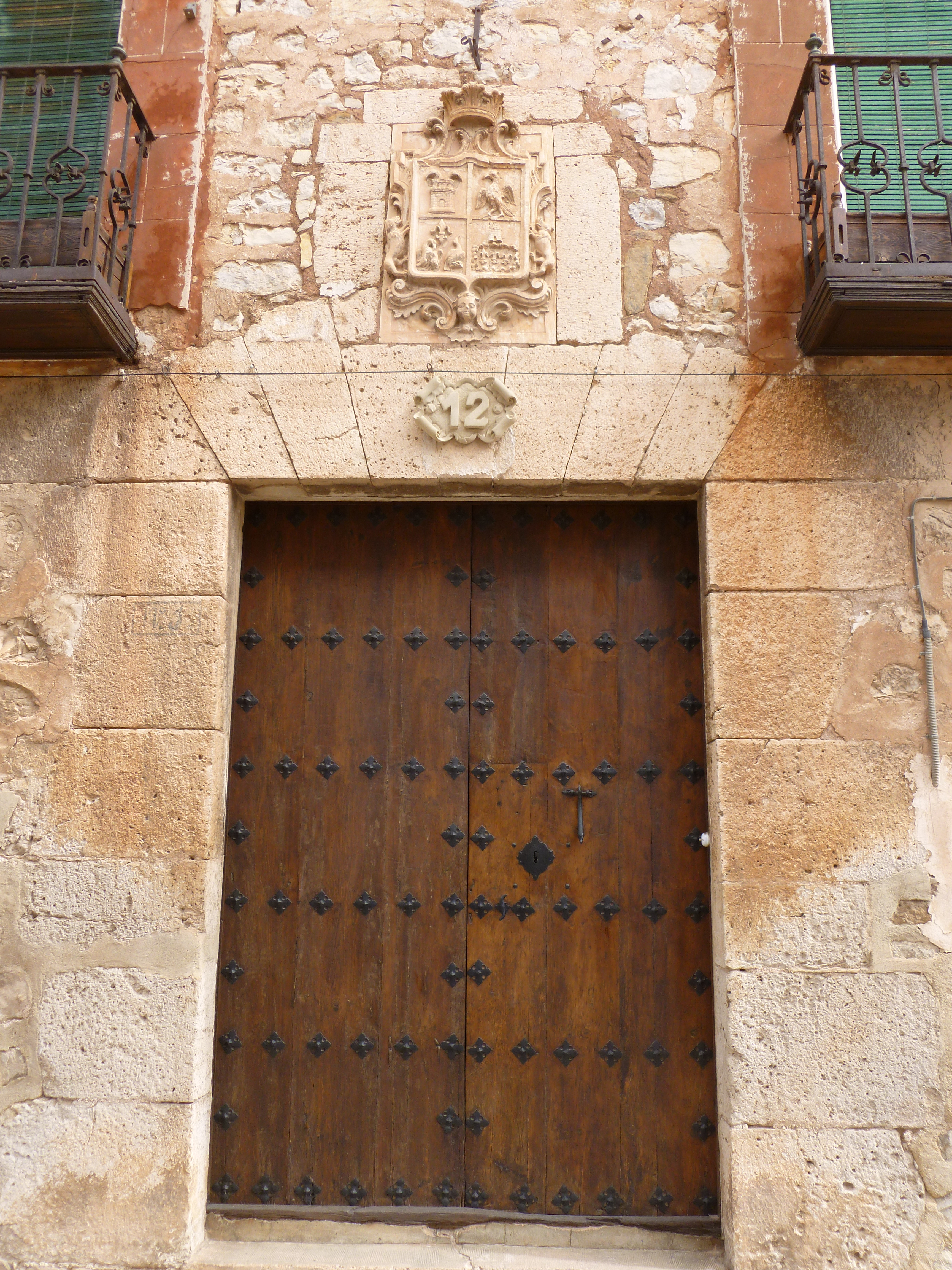 Santa Eulalia del Campo